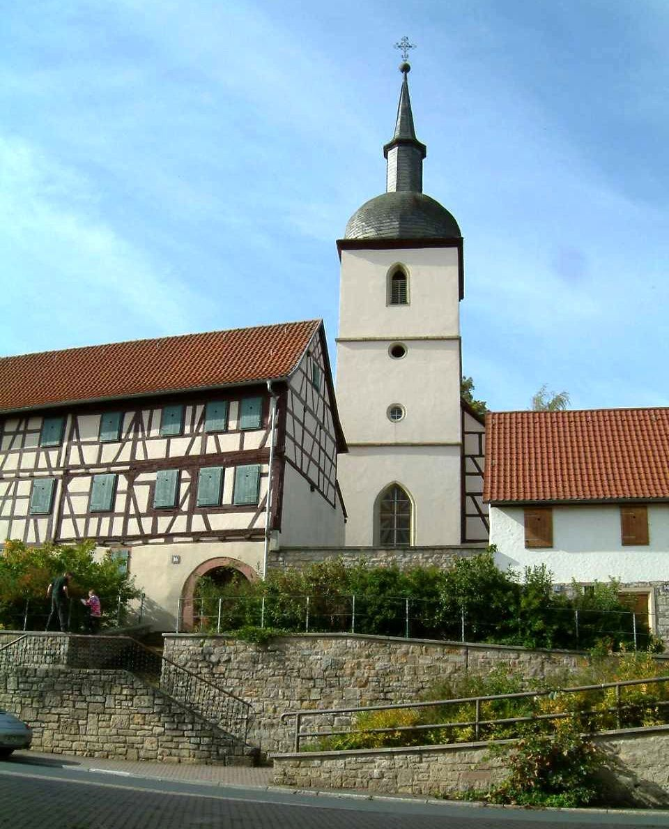 Michaeliskirche